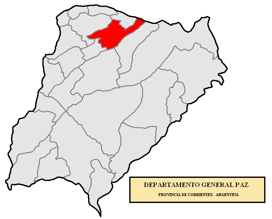 Ubicación de General Paz Localización del Departamento General Paz, en la provincia de Corrientes, Argentina.